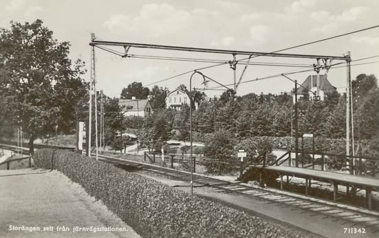 Storängen, vy från järnvägsstationen